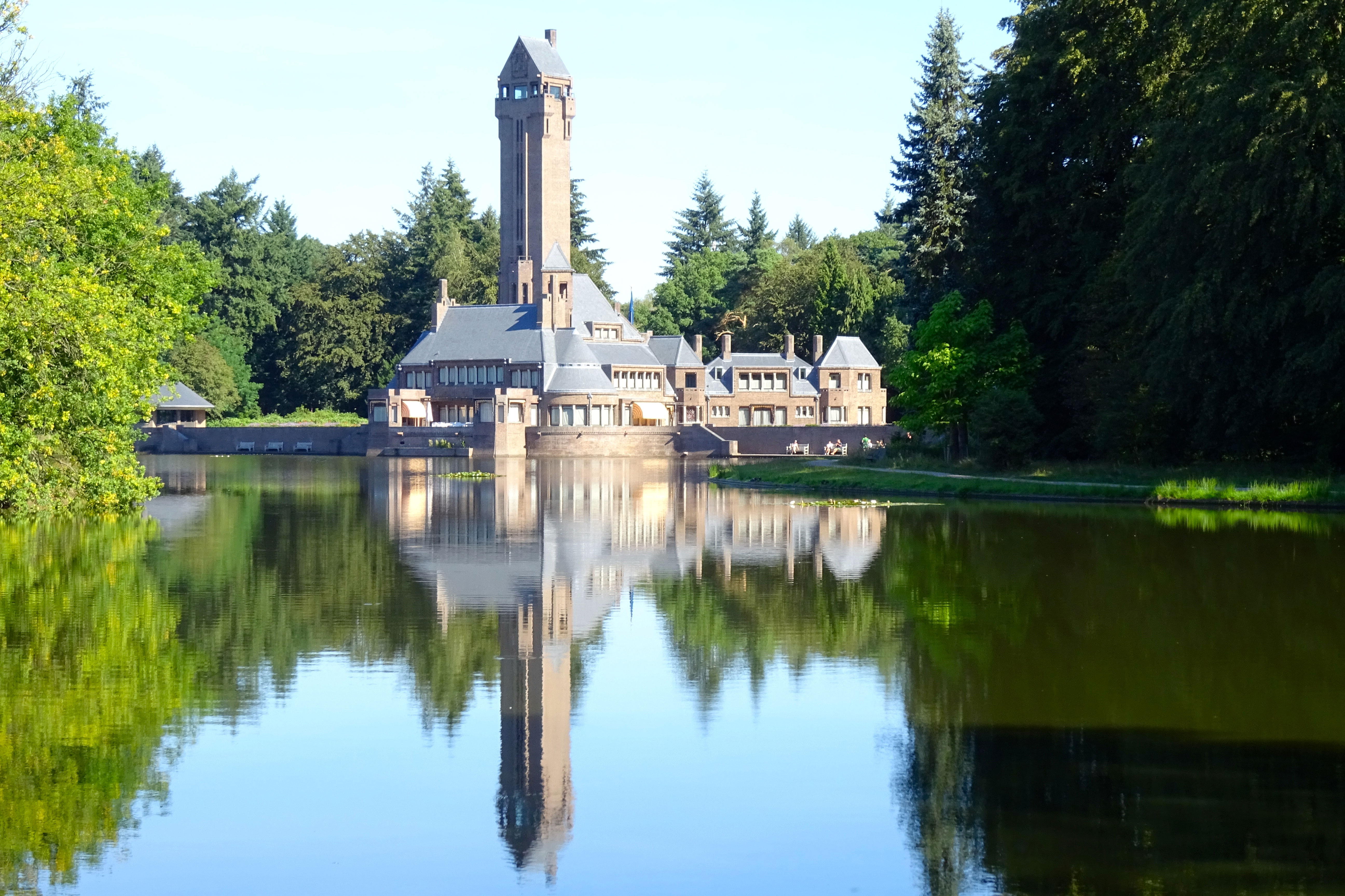 Jachtslot Sint-Hubertus, ontworpen door Hendrik Petrus Berlage